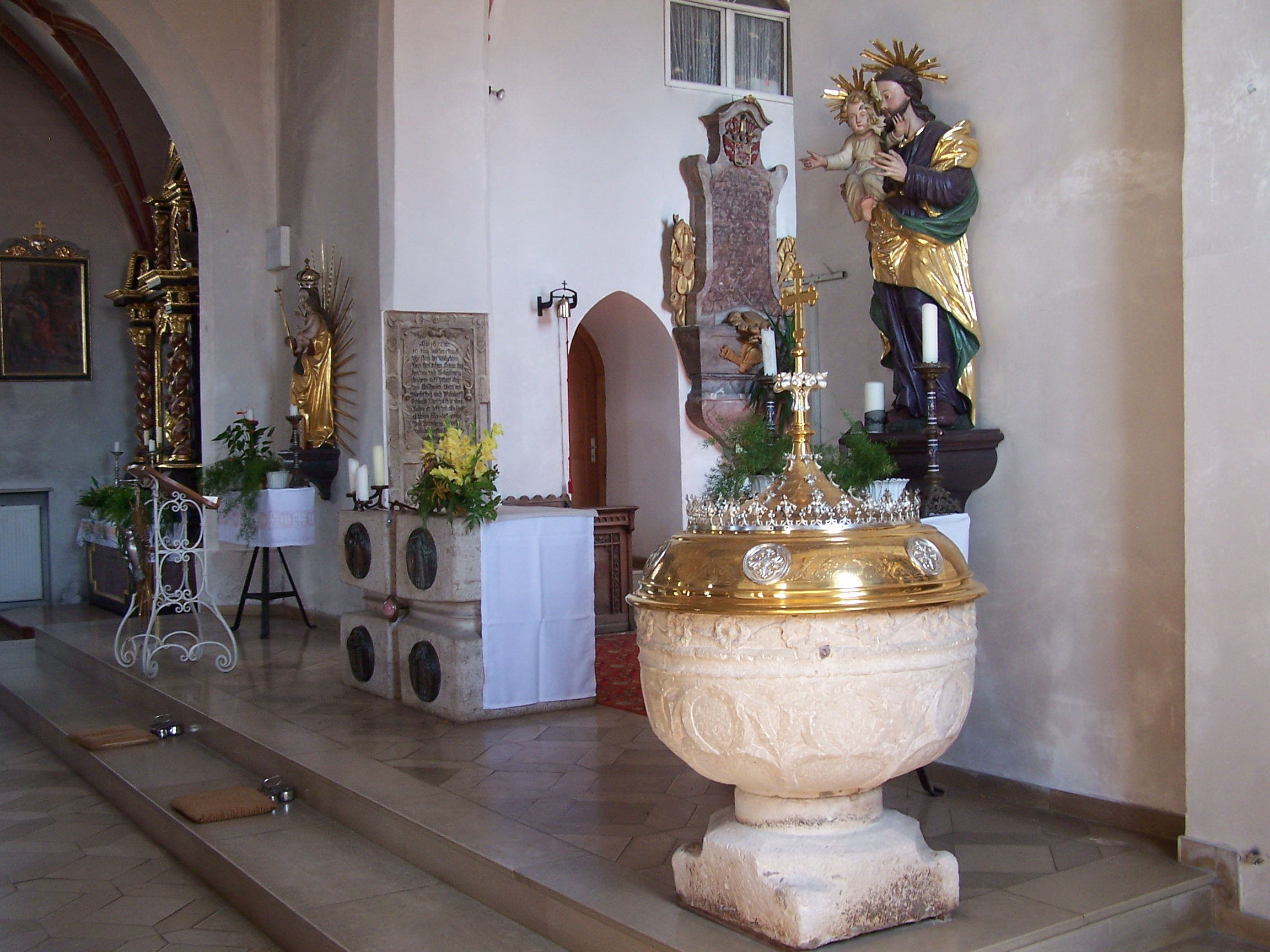 Obersüßbach, Kirchgasse 7, Katholische Pfarrkirche St. Jakobus der Ältere. im Kern romanische Chorturmanlage, spätgotisch verändert, 1877/80 neugotisch erweitert durch Verlängerung nach Westen und Anbau der Seitenschiffe. Gotischer Taufstein aus dem 14. Jahrhundert.